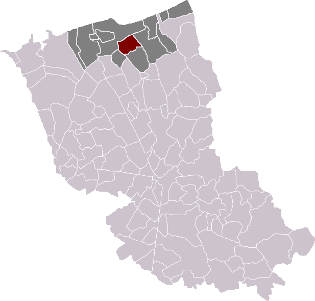 Locatie gemeente Nieuw-Koudekerke in arrondissement Duinkerke. Zelfgemaakt. Location of Coudekerque-Branche municipality in the arrondissement of Dunkirk. Self made. Localisation de la commune de Coudekerque-Branche dans l'arrondissement de Dunkerque. Fait moi-même.